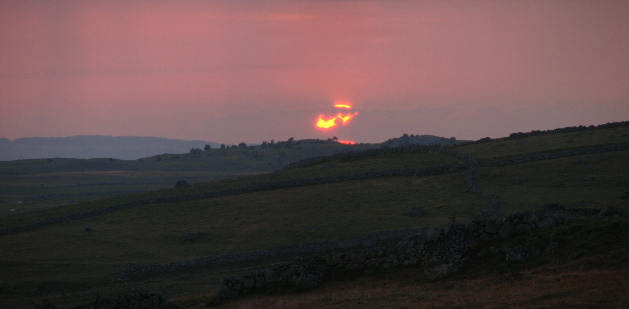 Aubrac - Coucher de soleil